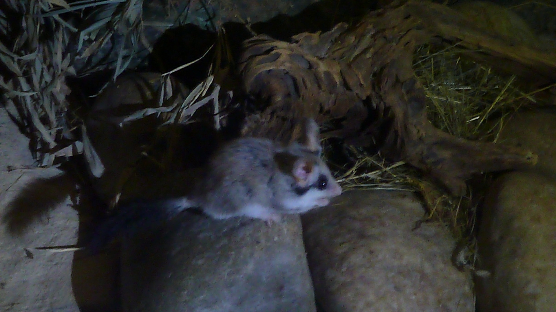 Wüstenschläfer (= Afrikanischer Bilch) in der Nachttierabteilung